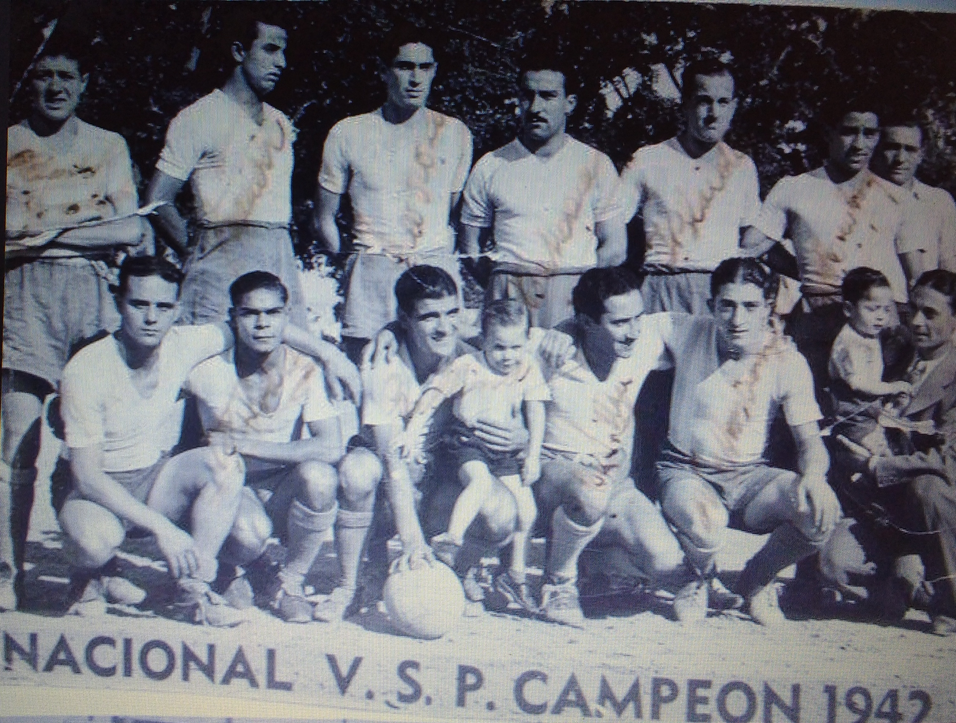 Nacional Vélez Sársfield Pacifico (Actual Atlético Argentino de Mendoza) Campeón 1942